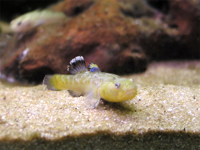 Desert goby, Chlamydogobius eremius, male